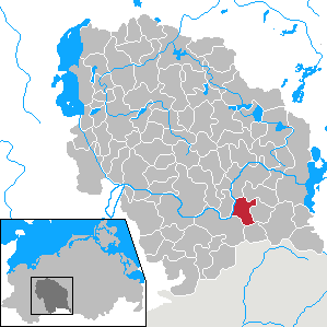 Kreien in Mecklenburg-Vorpommern - District Parchim